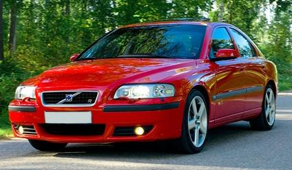 Volvo S60R 2004 Passion Red